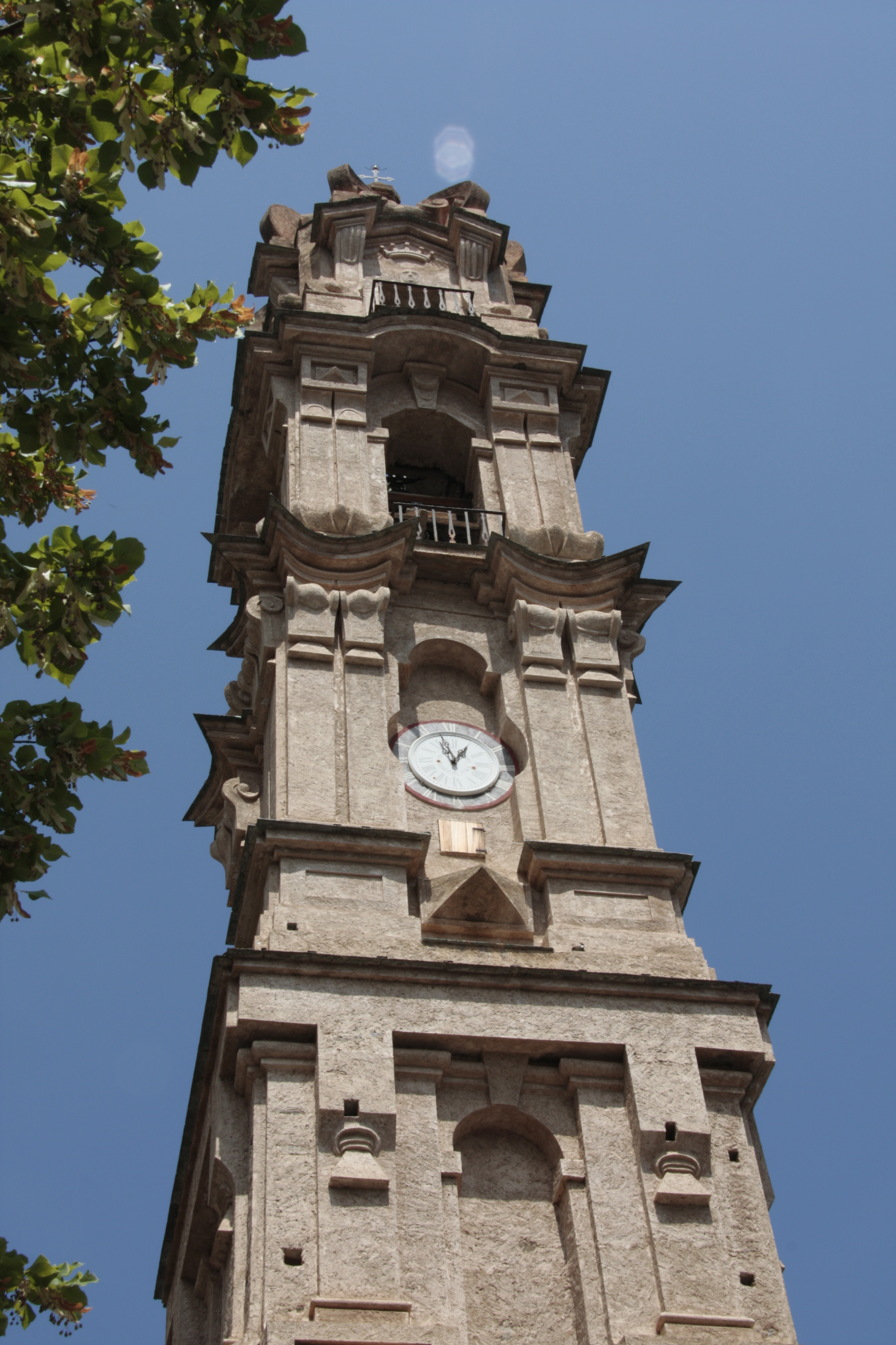 campanile